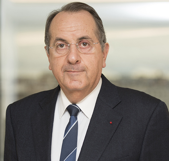 Michel Delpuech